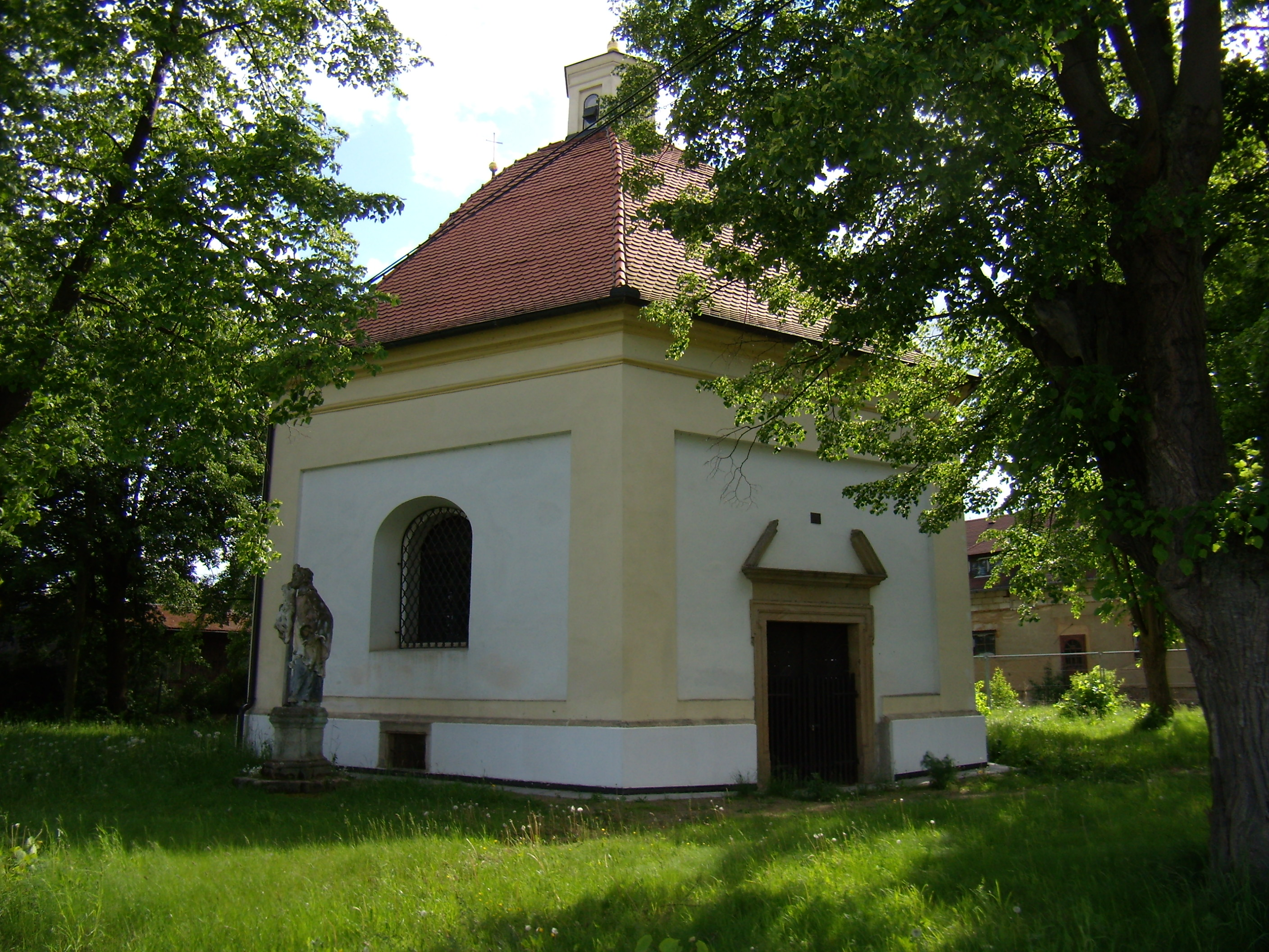 Hracholusky - kaple sv. Diviše